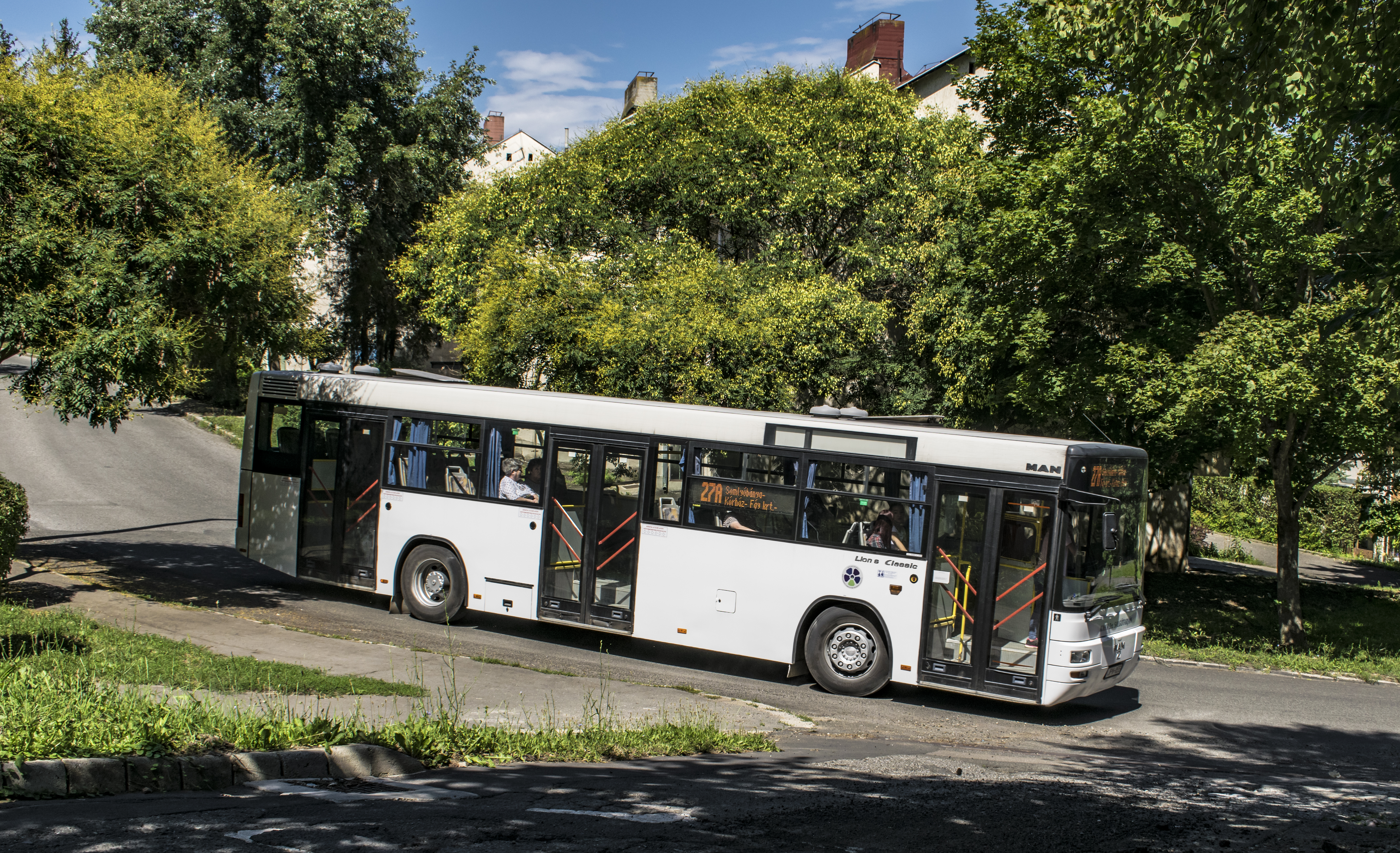 A KMKK Zrt. JPN-855 forgalmi rendszámú MAN SL 223 (Lion's Classic) típusú autóbusza a 27A jelzésű járattal Salgótarjánban a Kercseg úton